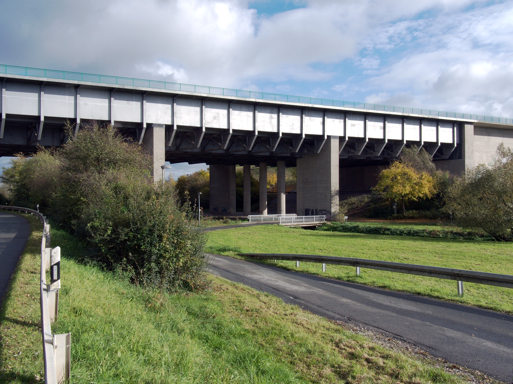 Überführung des Main-Donau-Kanals in einer Trogbrücke östlich von Flexdorf (Ortsteil der Stadt Fürth). Überquert werden von Norden nach Süden (im Bild links nach rechts) die Flexdorfer Straße, der Fluss Zenn und die Stadelner Straße (rechts im Hintergrund).